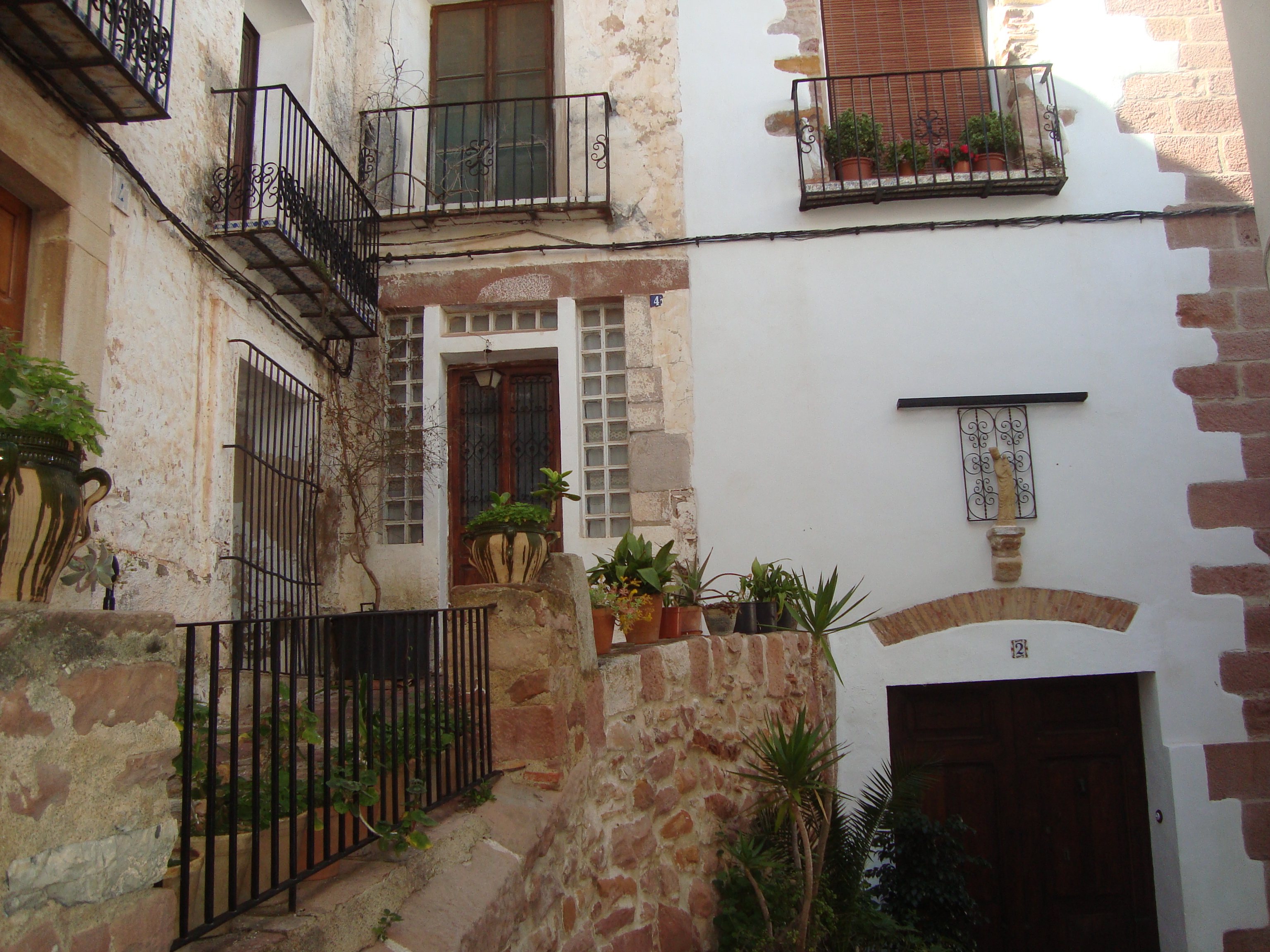 Racons de Vilafamés